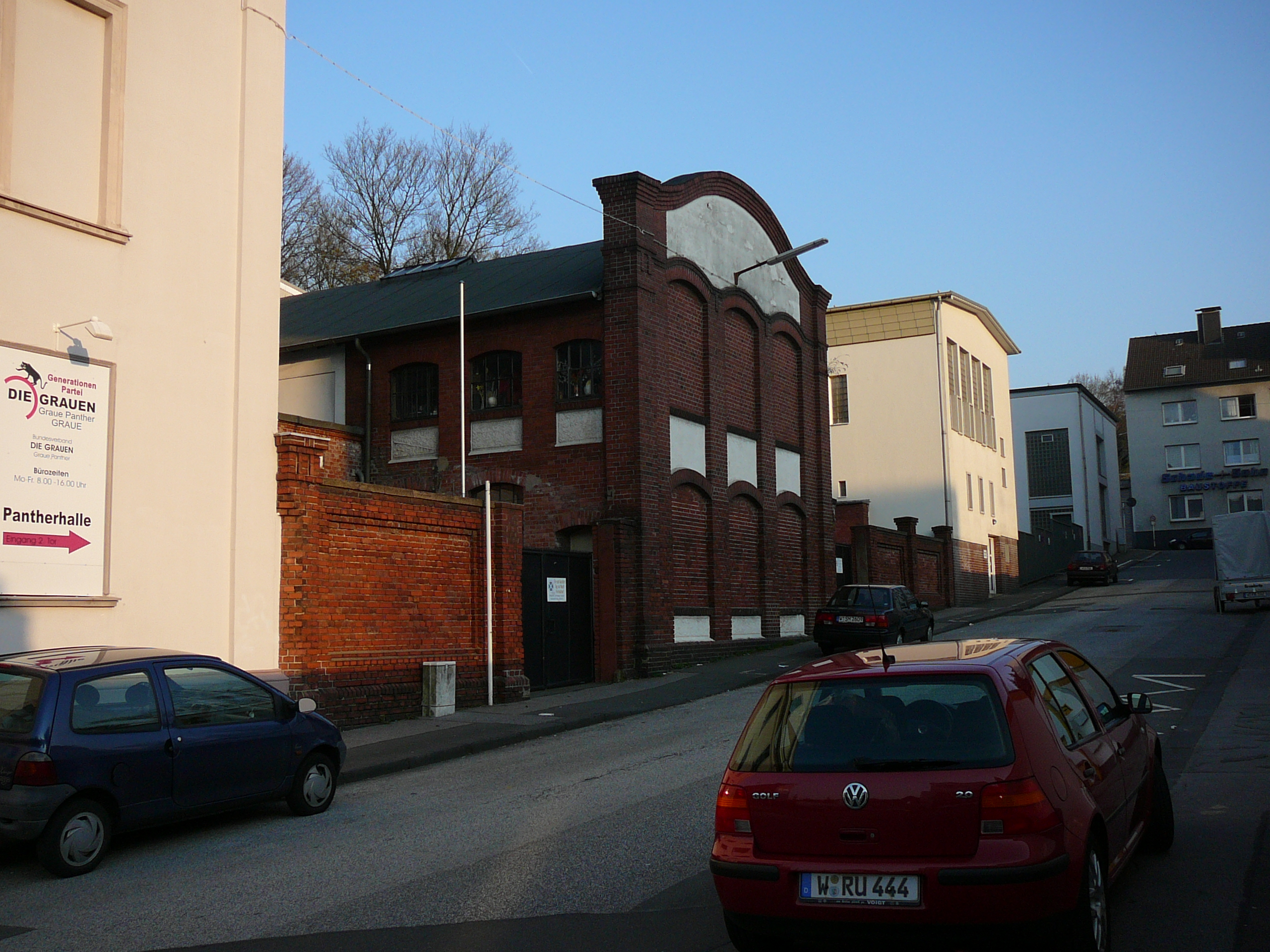 Friedrich-Engels-Allee, Wuppertal